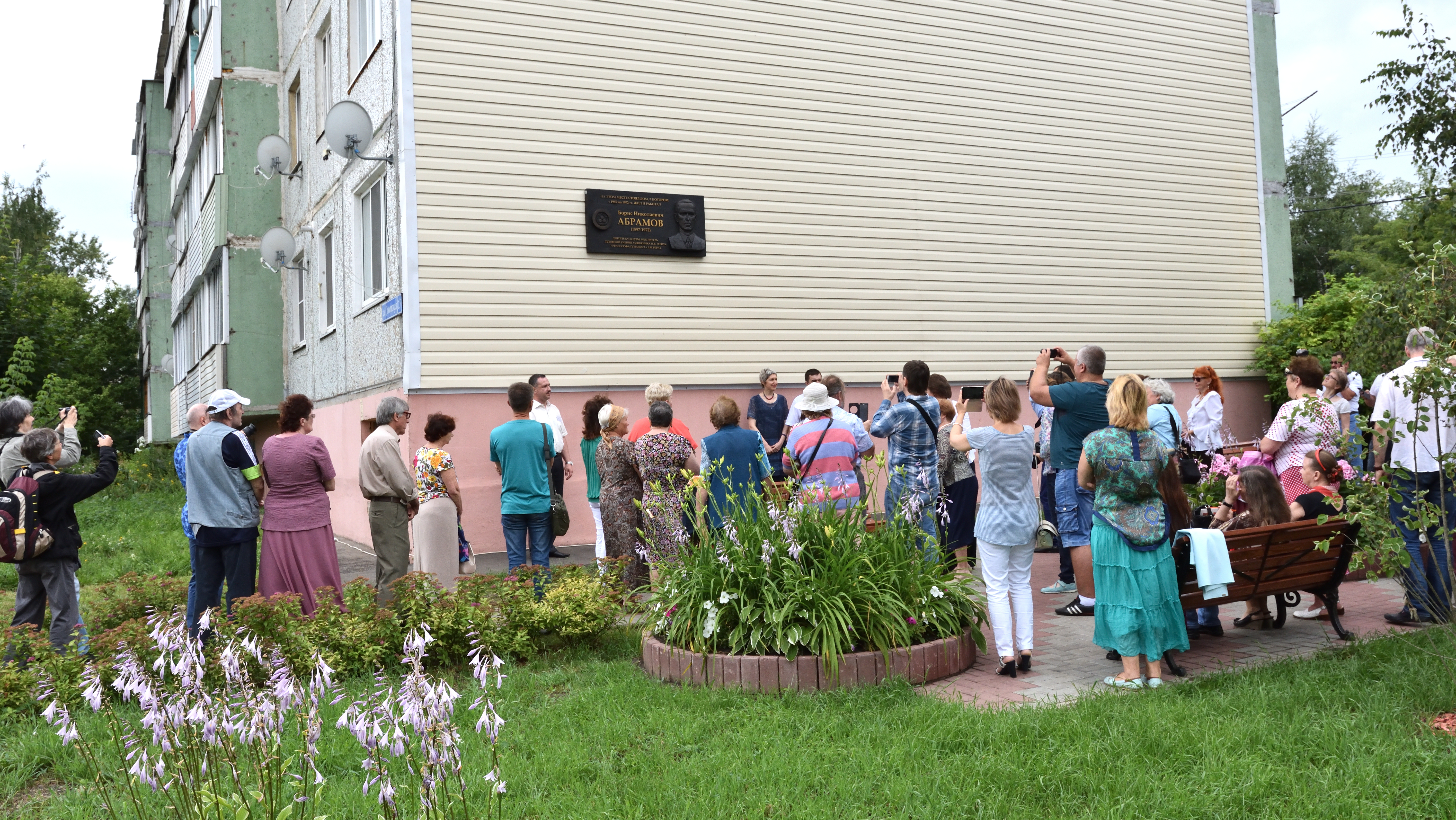 Сквер имени Б. Н. Абрамова в г. Венёве. 30.07.2017 г. Открытие новой Мемориальной доски, посвященной Б. Н. Абрамову. Скульптор А. Д. Леонов.